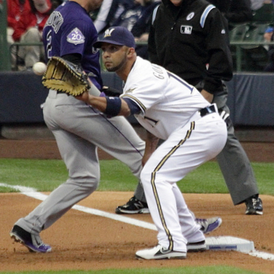 Álex González